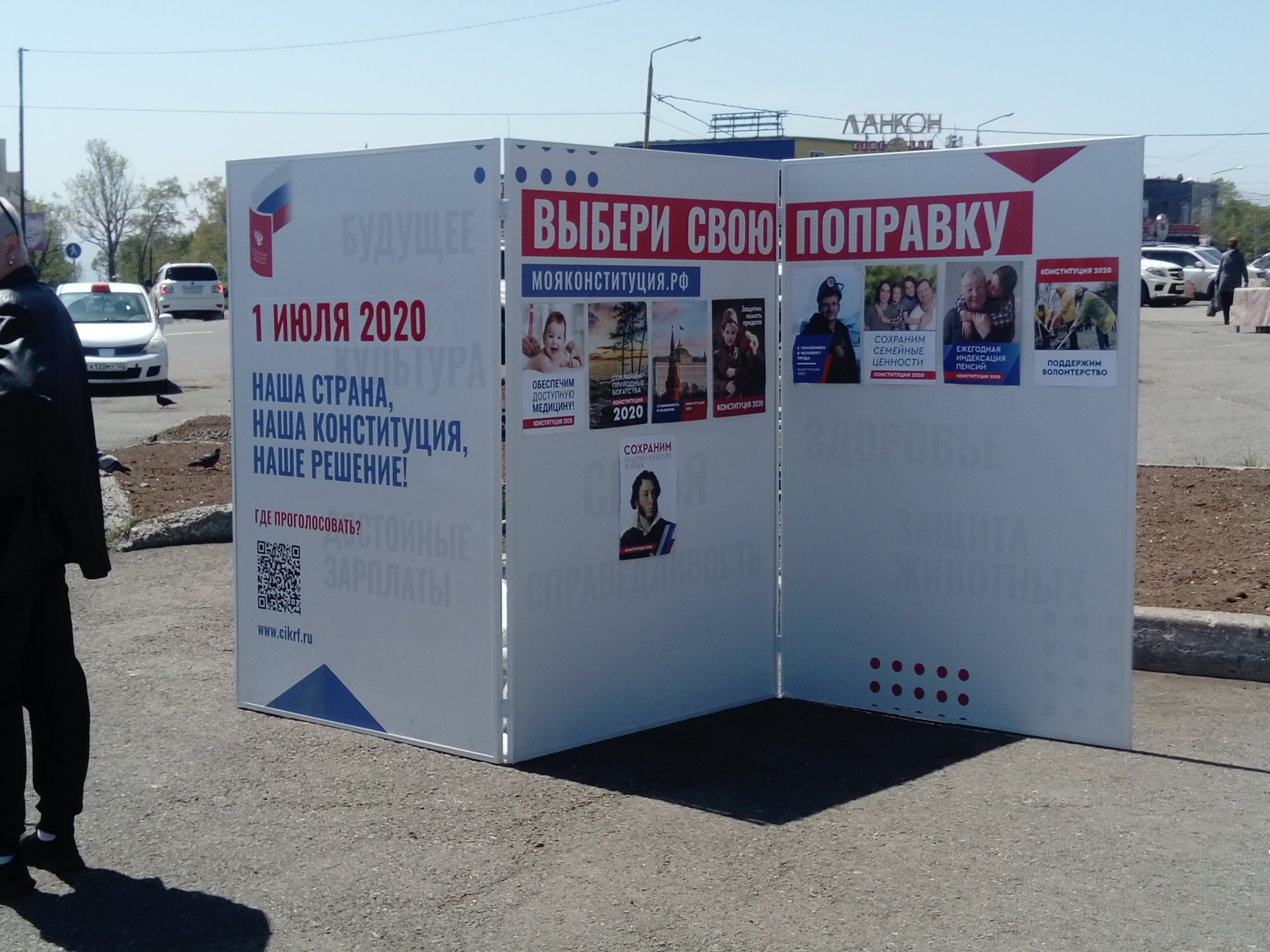 Информационный / агитационный уличный стенд Поправки в Конституцию Российскую Федерации 2020 Общероссийское голосование 1 июля 2020 Петропавловск-Камчатский